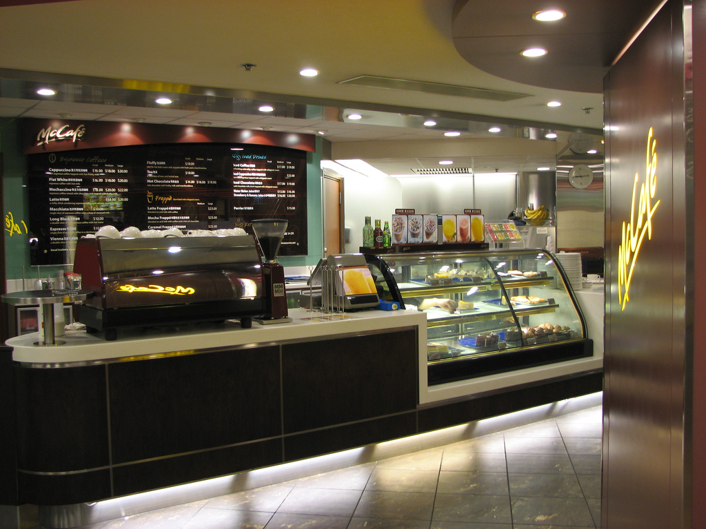 A McCafé in Hong Kong.